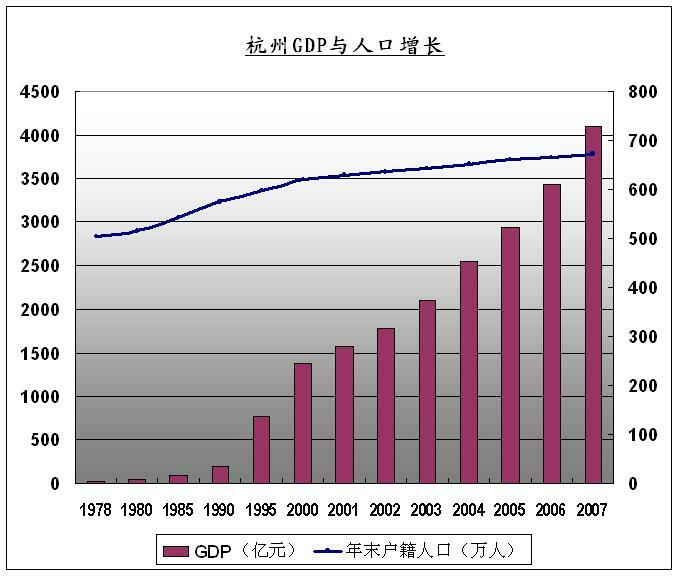 1978年至2007年杭州GDP与人口增长图